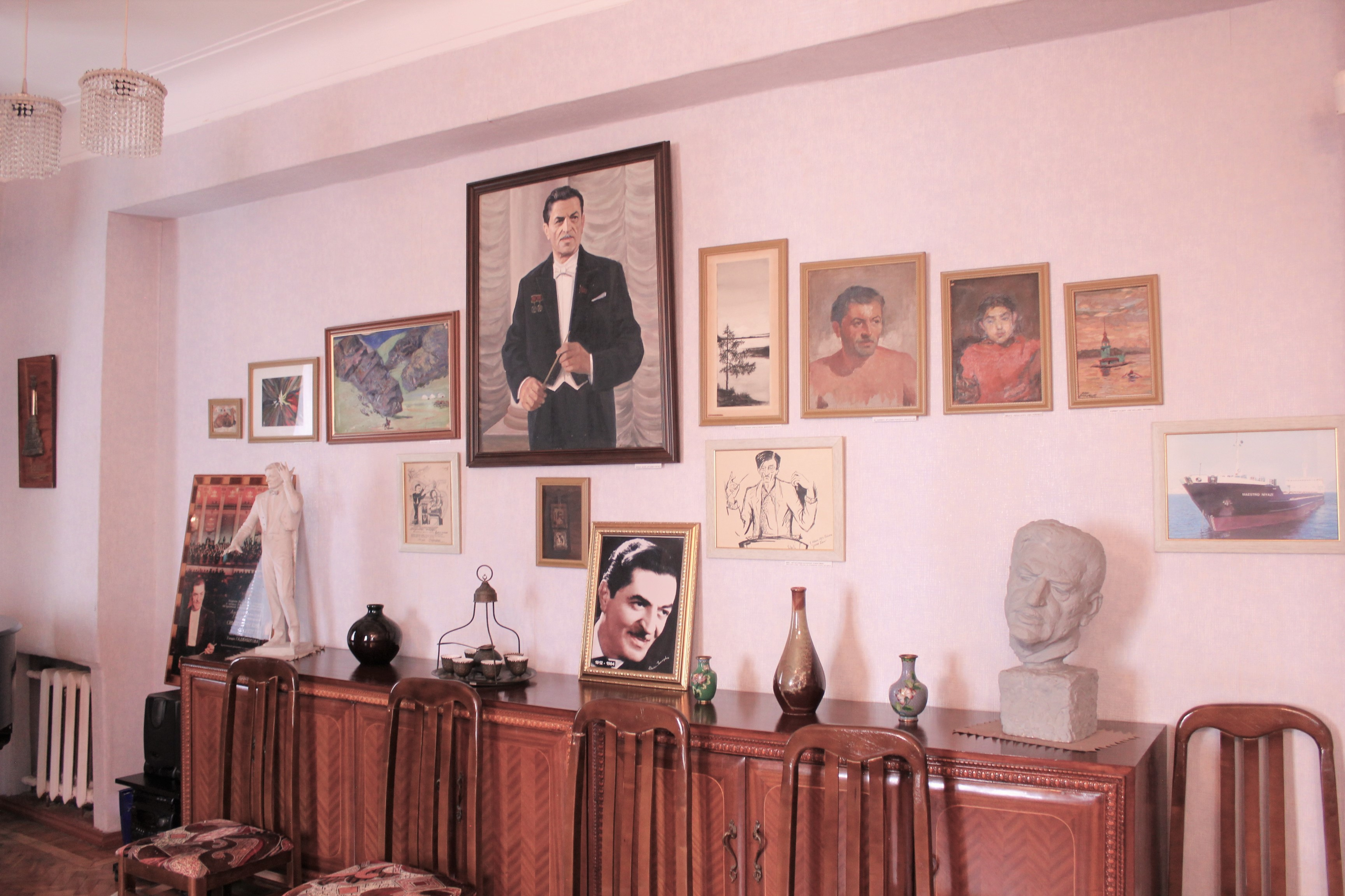 Интерьер гостиной комнаты дома-музея азербайджанского дирижера и композитора Ниязи. На стенах комнаты демонстрируются фотографии, отражающие широкую общественную деятельность Ниязи, произведения изобразительного искусства и другие предметы, подаренные семье в разные годы.